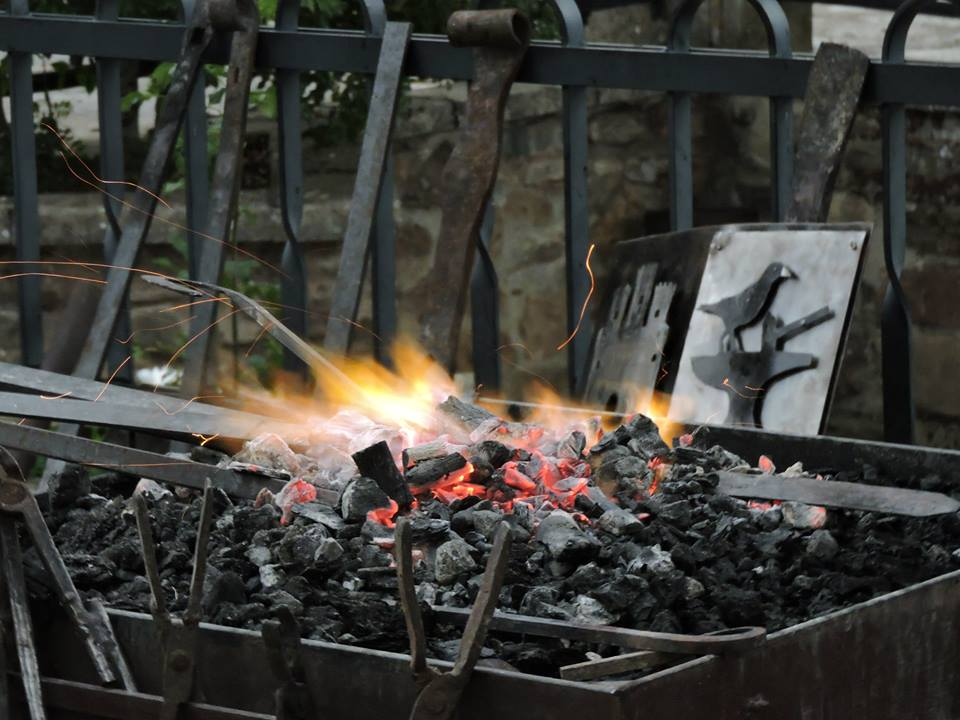 Elaborada por forjas Brum